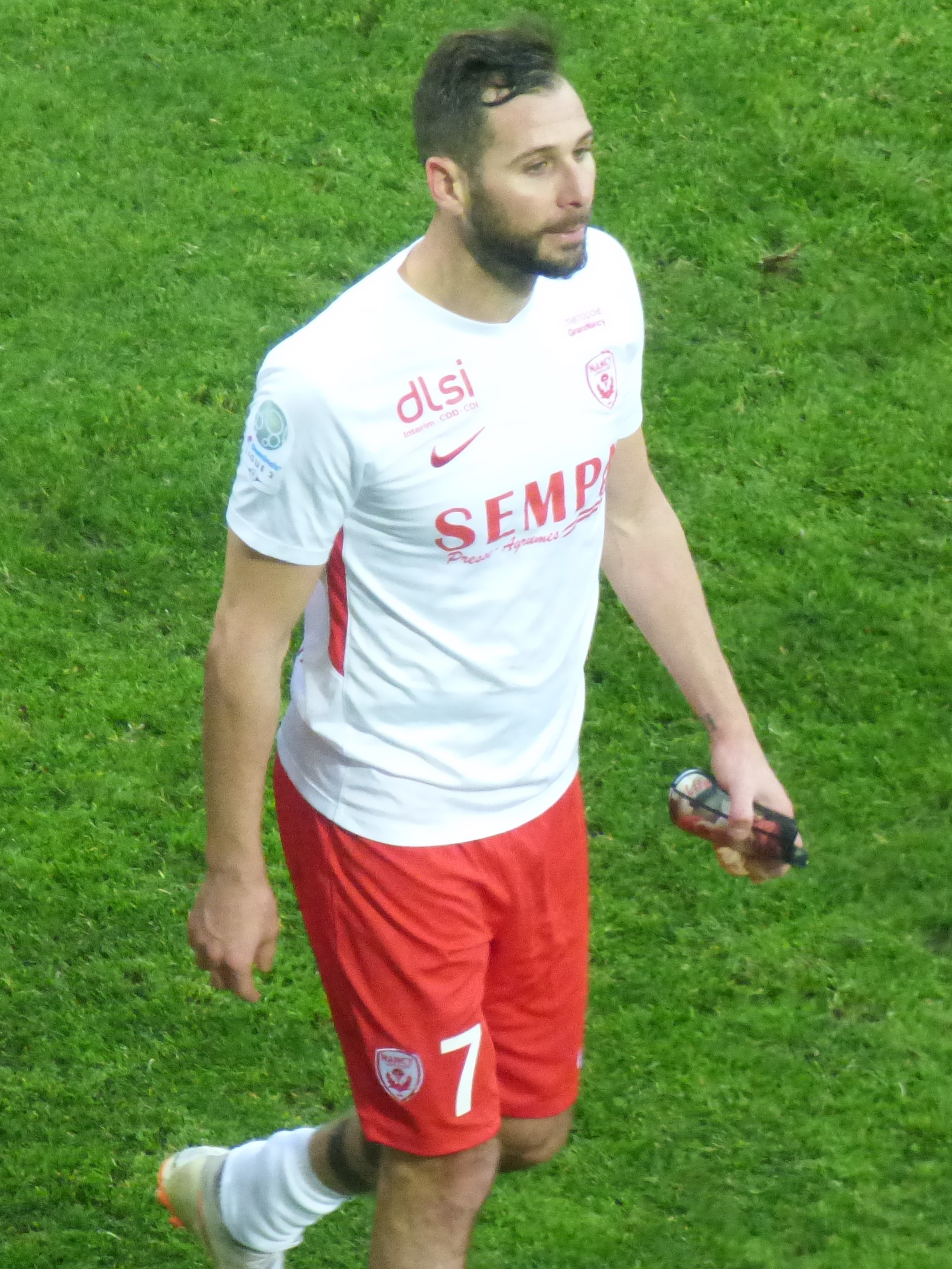 Antony Robic lors du match RC Lens / AS Nancy-Lorraine, comptant pour la vingt-et-unième journée du championnat de France de football de Ligue 2 2018-2019, le 19 janvier 2019, au Stade Bollaert-Delelis de Lens.